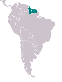 Legenda: As Guianas